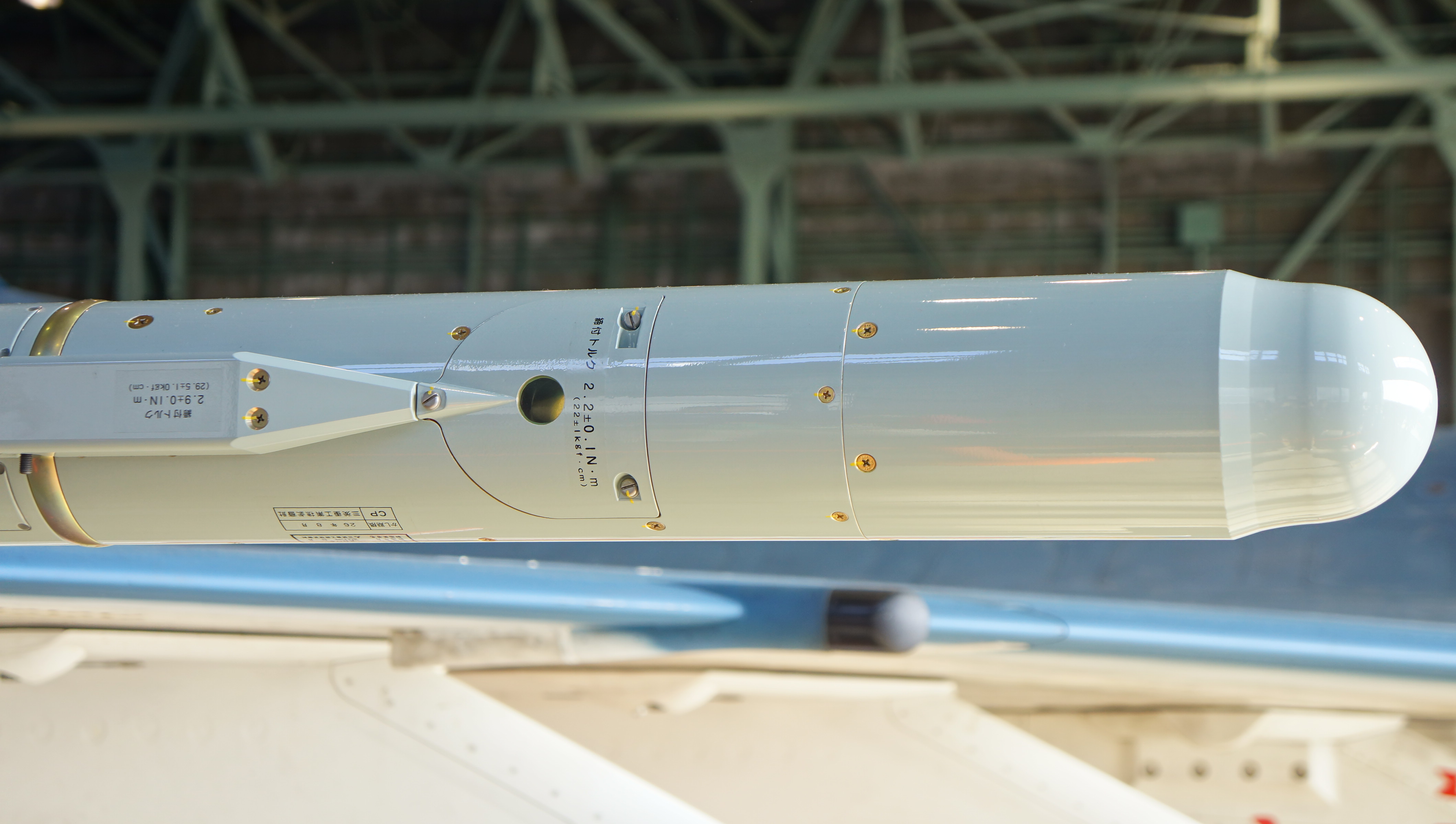 航空自衛隊 04式空対空誘導弾（AAM-5） シーカー。 13年11月24日 航空自衛隊岐阜基地にて。